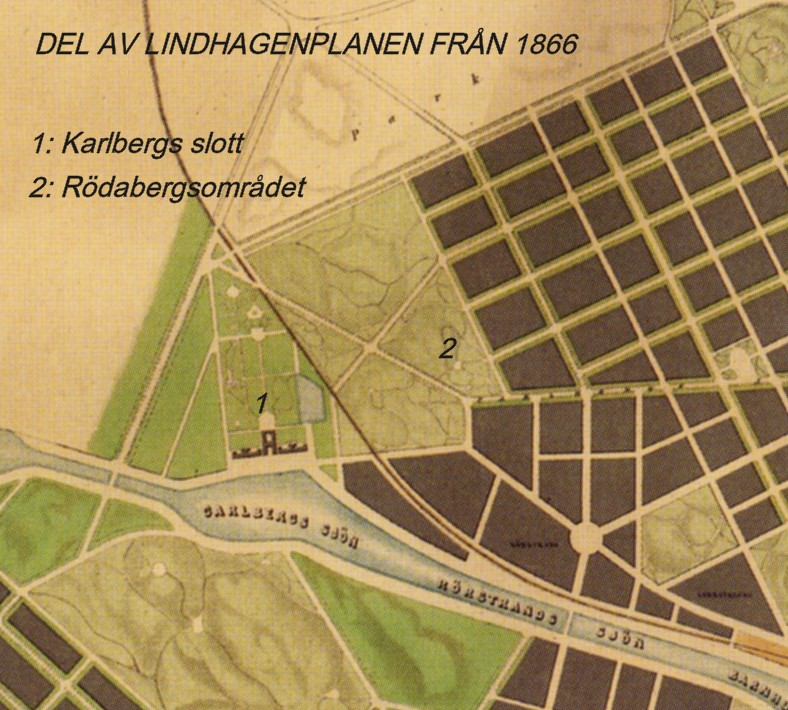 Del av Lindhagenplanen som visar "Rödabergsområdet"